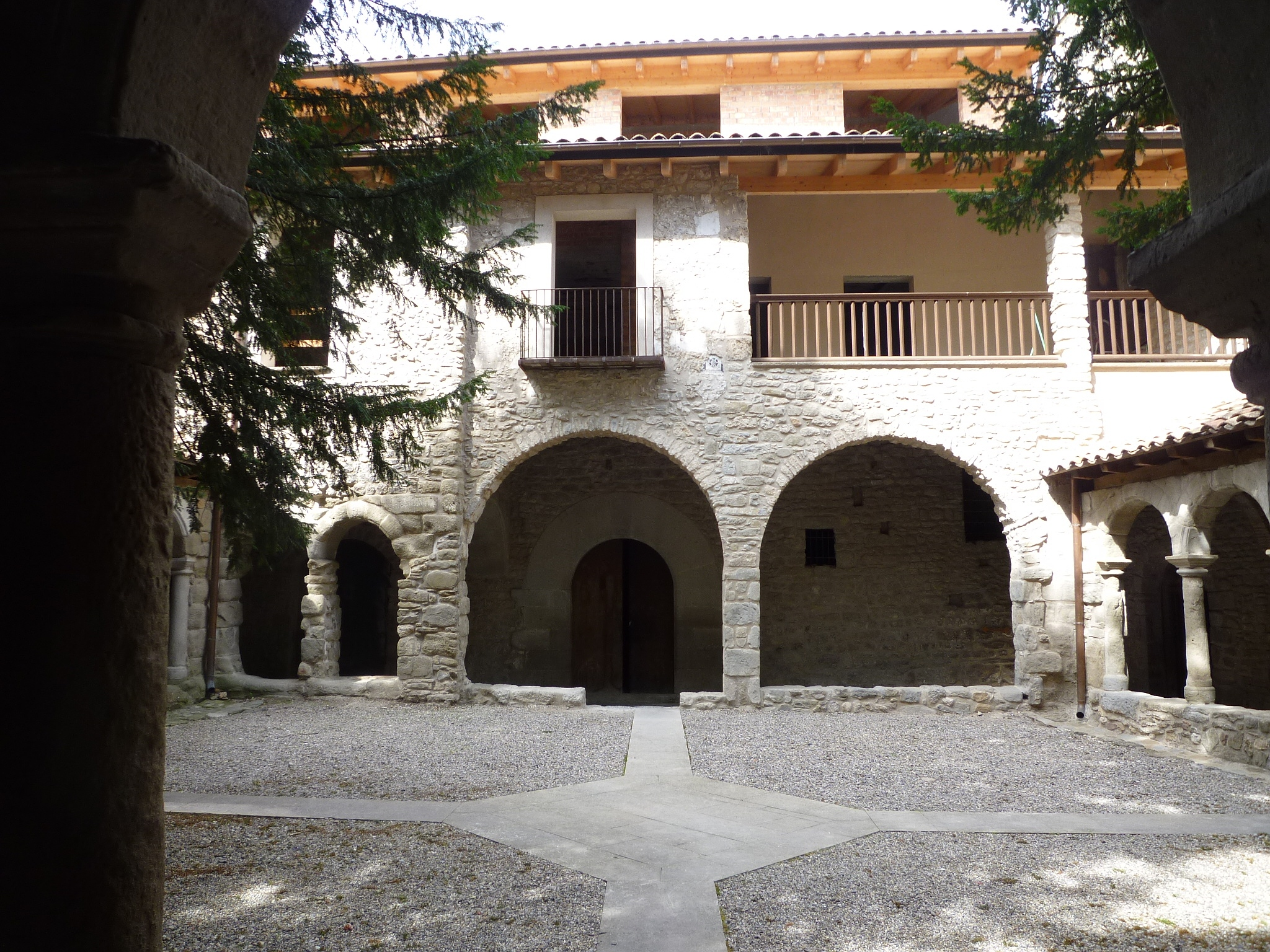 Església de Sant Llorenç de Morunys: Claustre